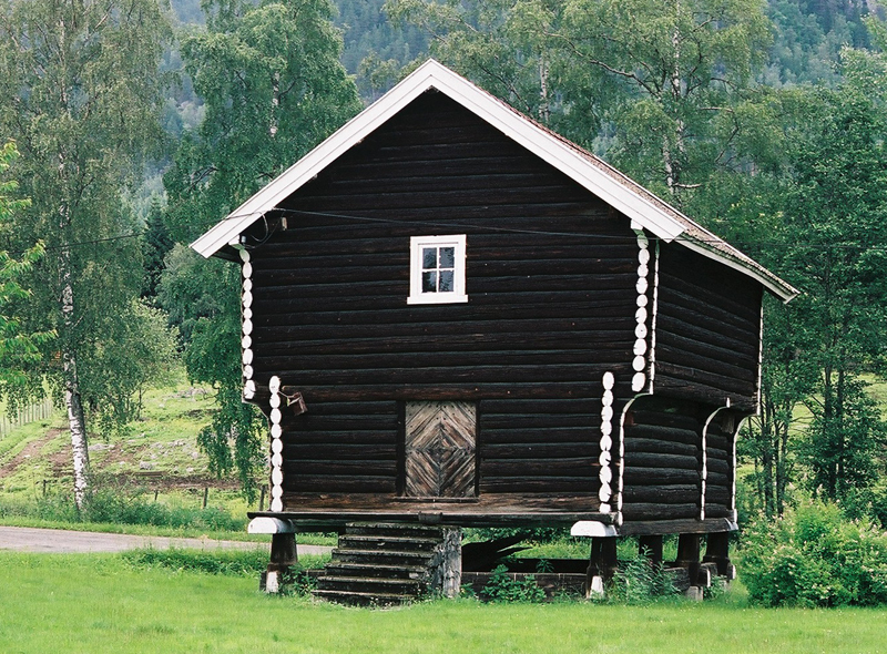 Prestens stabbur, Flesberg prestegard. 1800-tallet. freda 1991.